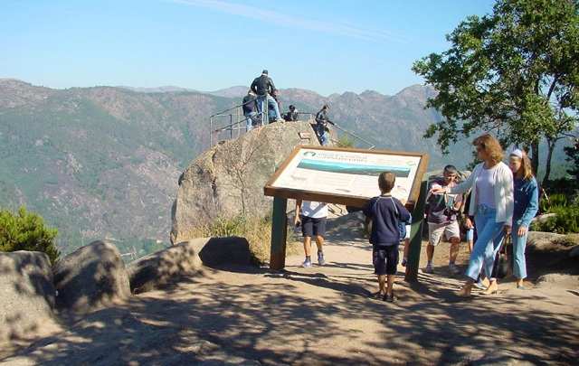 Miradouro da Pedra Bela, Vila do Gerês - Terras de Bouro